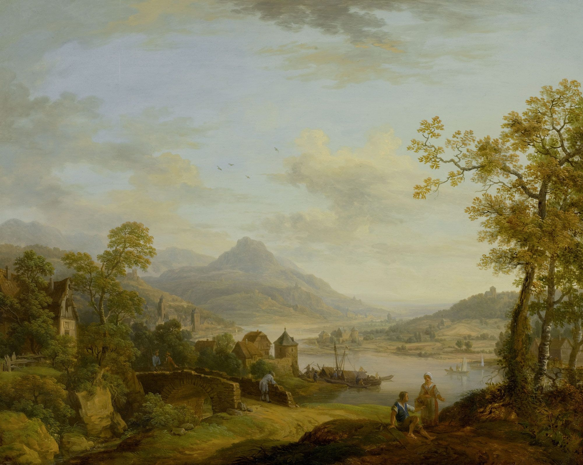 counter part to File:Christian Georg Schütz d.Ä. - Rheinische Landschaft mit Schloss auf einem Hügel.jpg